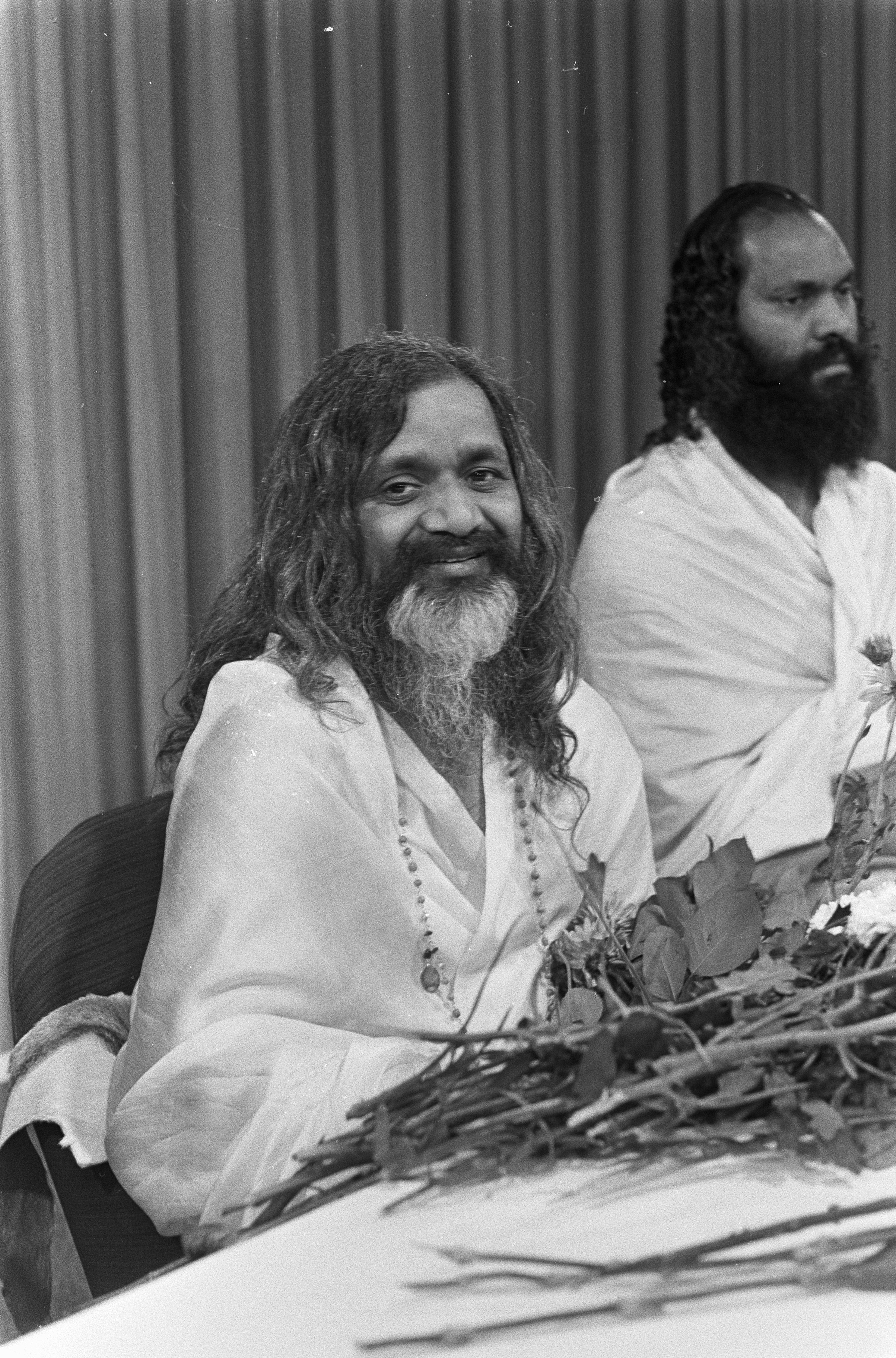 Collectie / Archief : Fotocollectie Anefo Reportage / Serie : [ onbekend ] Beschrijving : Aankomst Maharish Makesh Yogi op Schiphol. M. M. Yogi vergezeld van Dramayari Dovendra (rechts) op persconferentie Datum : 1 september 1967 Locatie : Noord-Holland, Schiphol Trefwoorden : aankomsten, persconferenties Persoonsnaam : Yogi, Maharishi Mahesh Fotograaf : Merk, Ben / Anefo Auteursrechthebbende : Nationaal Archief Materiaalsoort : Negatief (zwart/wit) Nummer archiefinventaris : bekijk toegang 2.24.01.05 Bestanddeelnummer : 920-6591